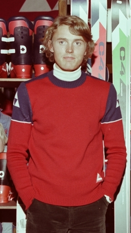 Odd Sørli